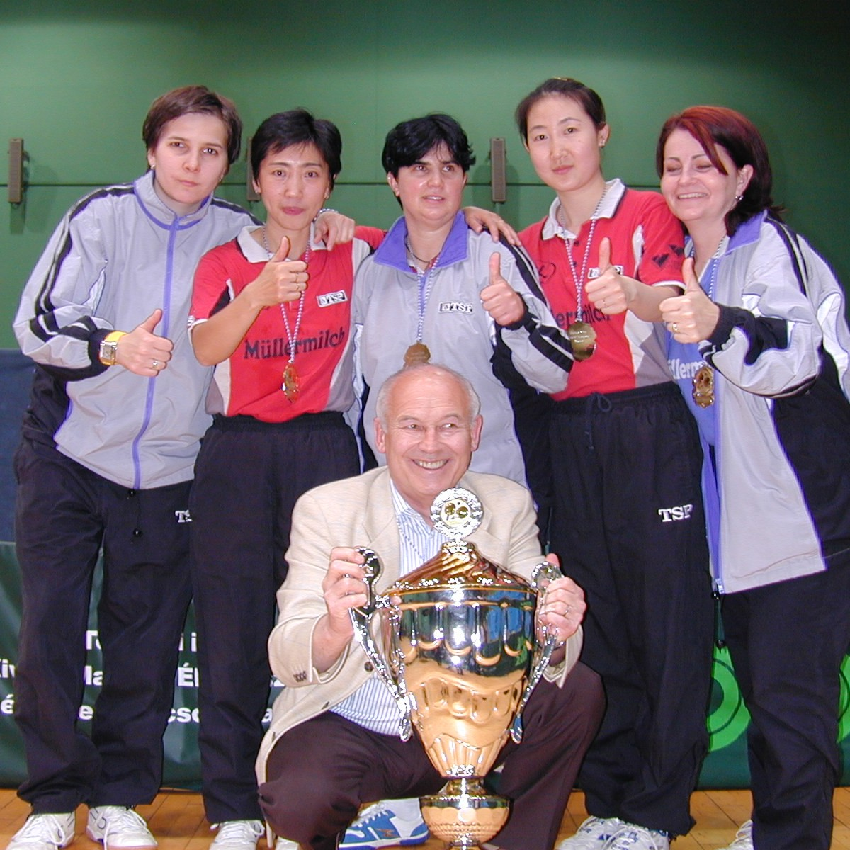 Das Tischtennis-Team von Müllermilch Langweid nach dem Gewinn des Europapokals der Landesmeister am 20.05.2005 in Budapest. v.l.n.r. Andrea Bakula, Yunli Schreiner, Csilla Batorfi, Lin Xu und Olga Nemes. Vorne: Manager Willy Schweinberger